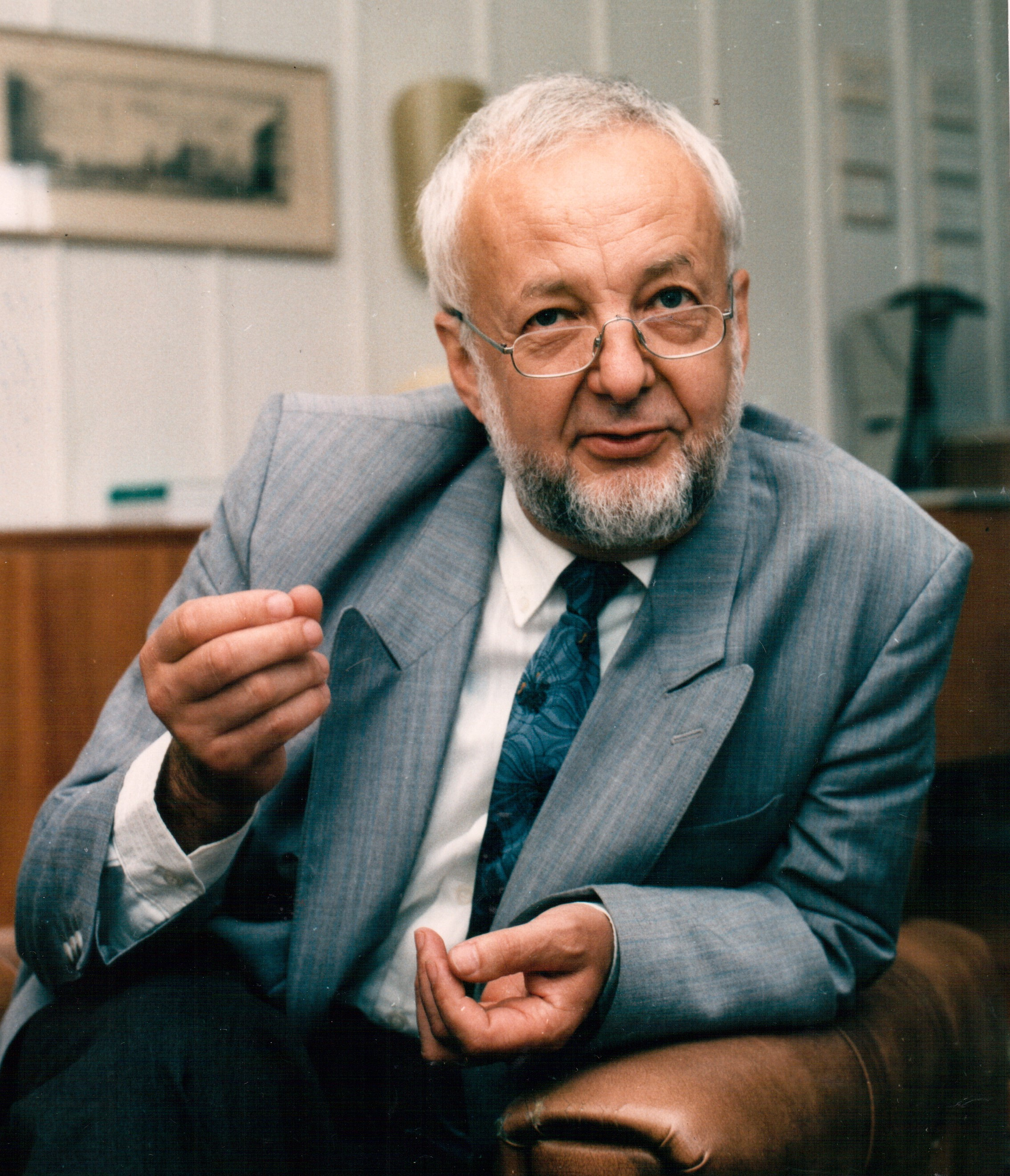 Peter Oehme in den Jahren im Institut für Wirkstofforschung, Berlin.